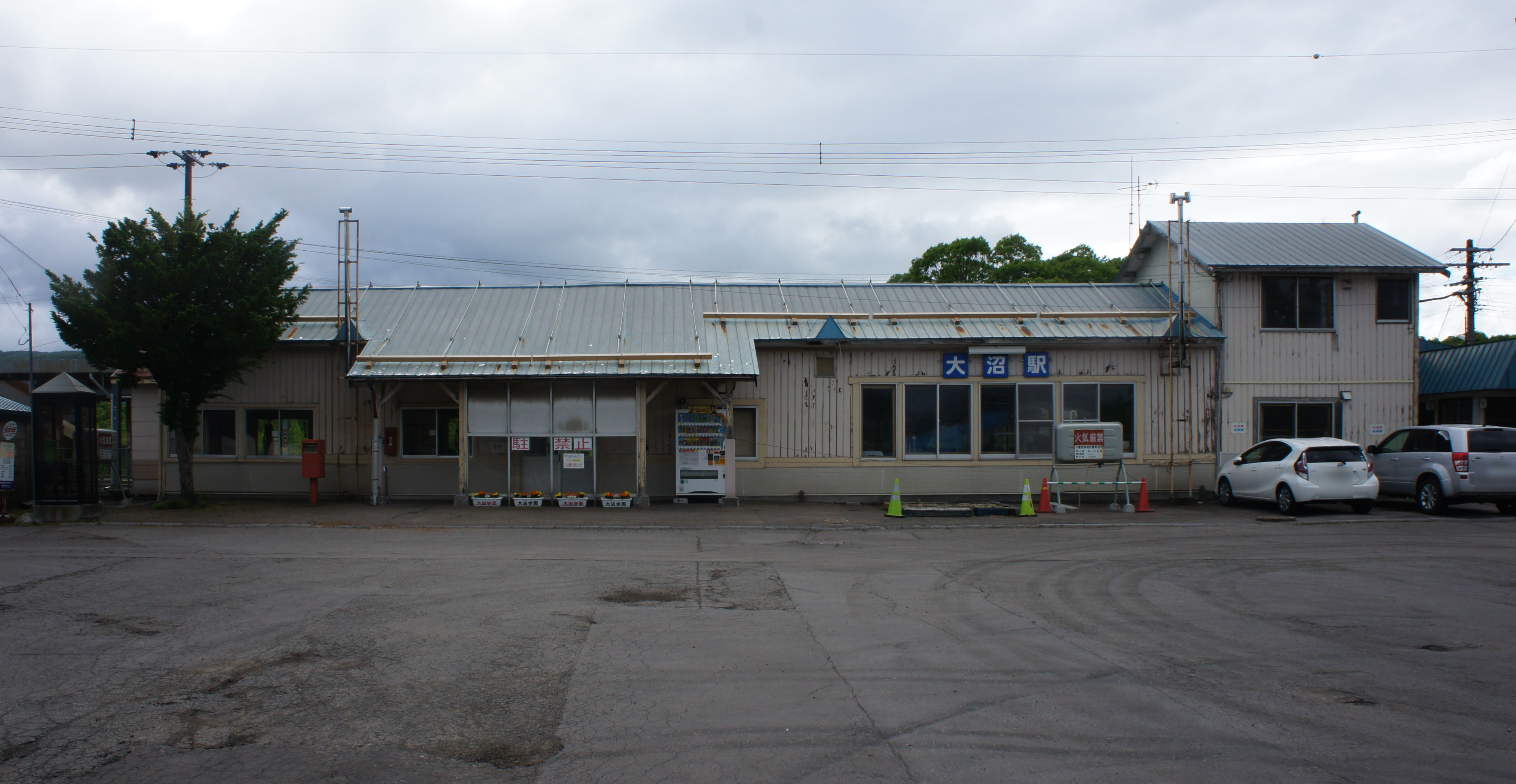 JR函館本線・大沼駅の駅舎